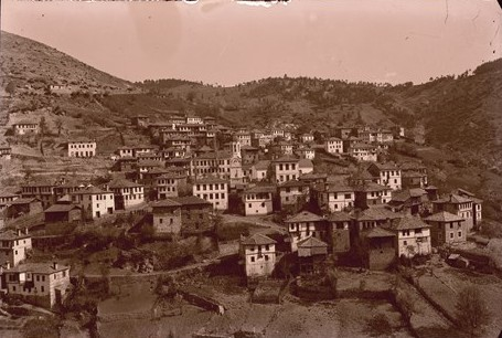 Общ изглед от с. Левочево, Смолянско.